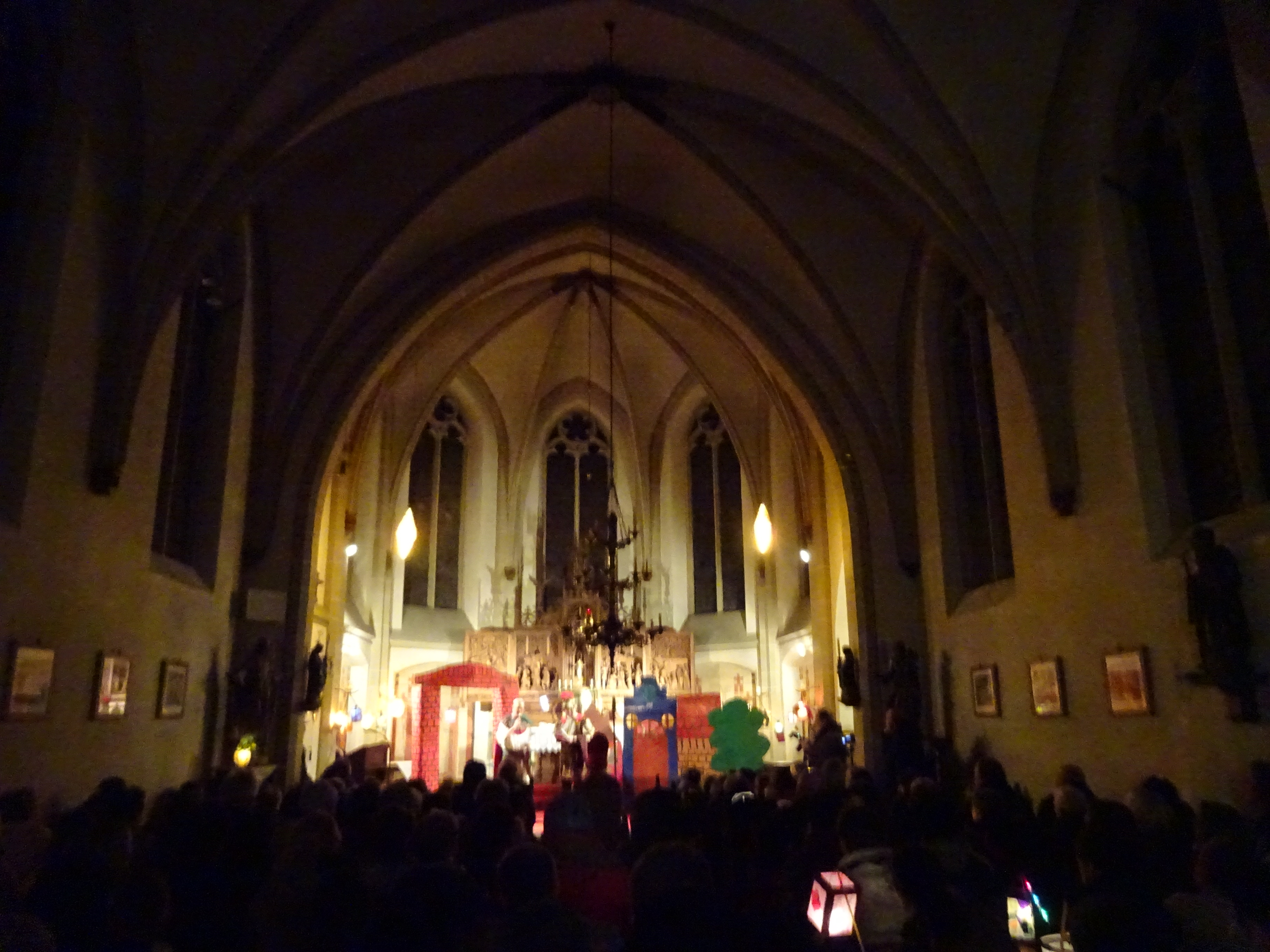 Bedburg-Hau. St. Martin's day in Huisberden, St. Peter